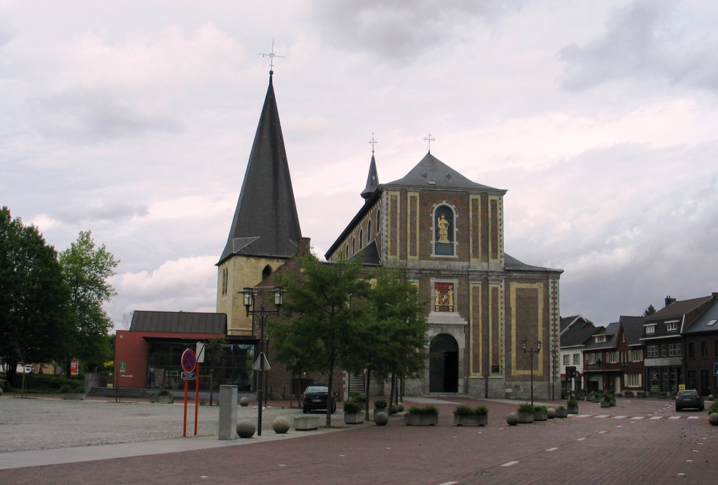 kerk in Zonhoven - eigen foto